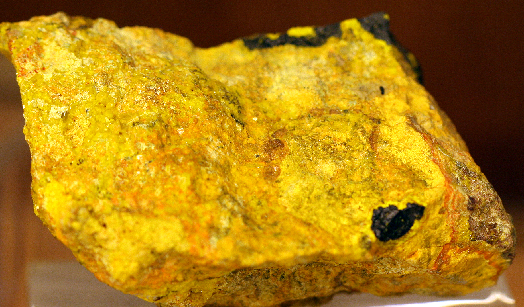 Schoepite (Amarillo oscuro) sobre becquelerita